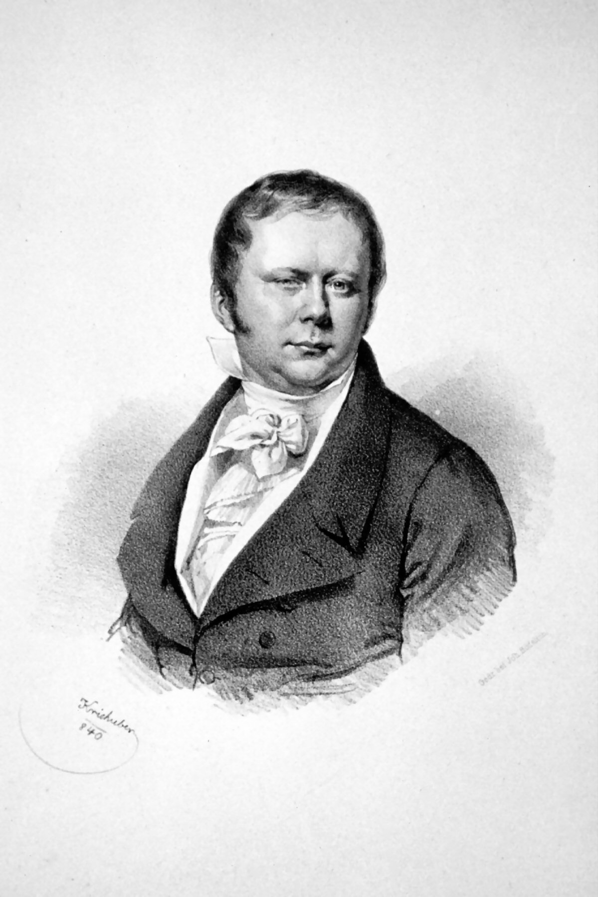 Josef Freiherr von Knorr (1790-1839), k. k. Staats- und Konferenzrat. Lithographie von Josef Kriehuber, 1840